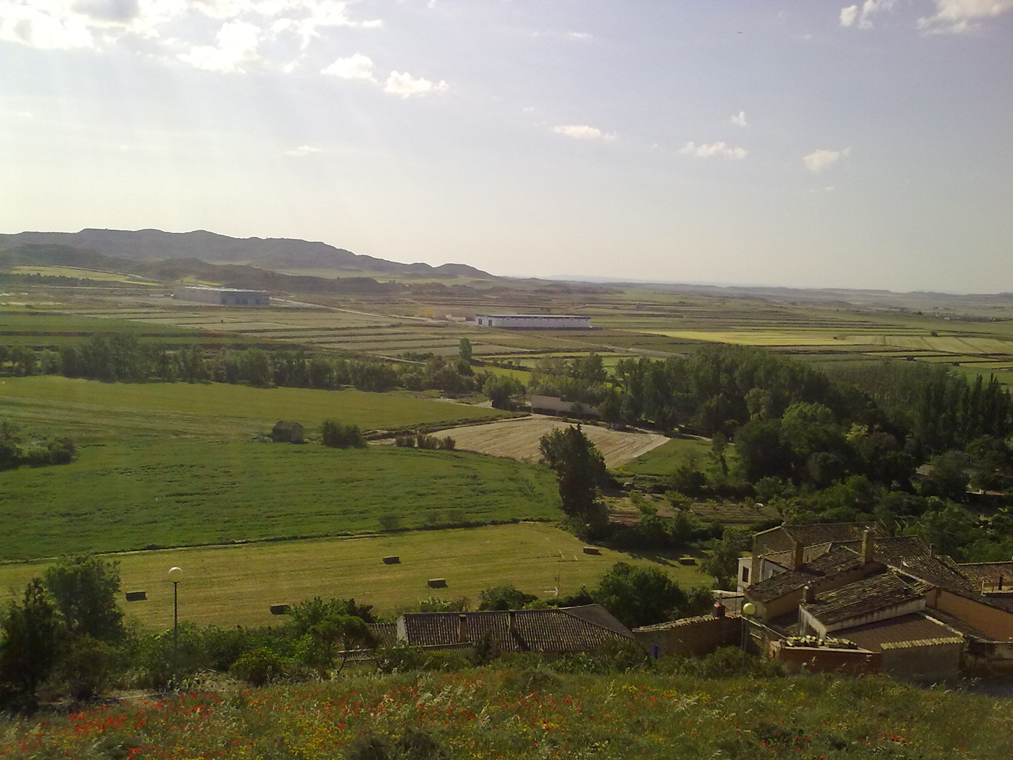 Erla le 24 mai 2010. Espagne.